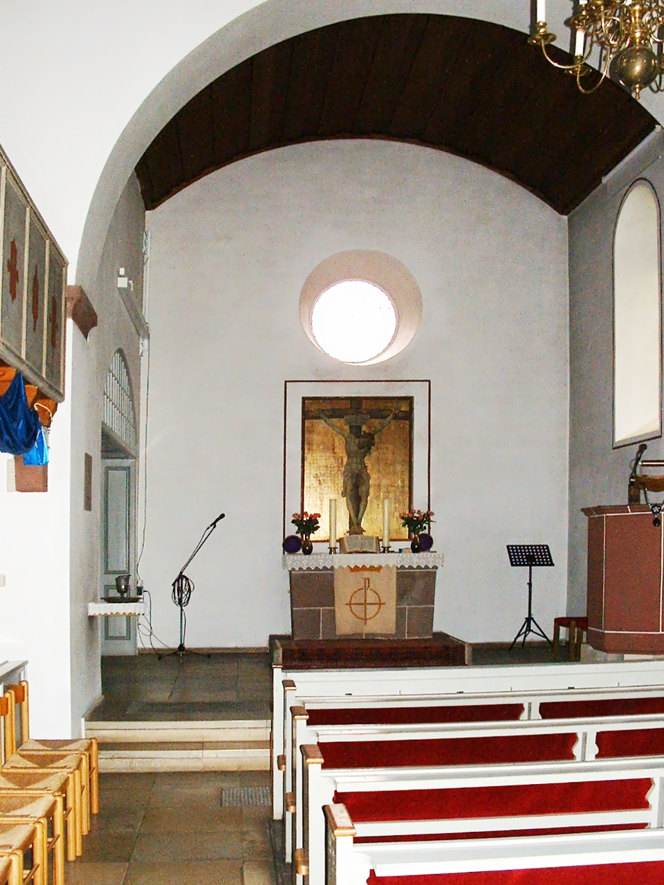 Evangelische Kirche, Bitburg